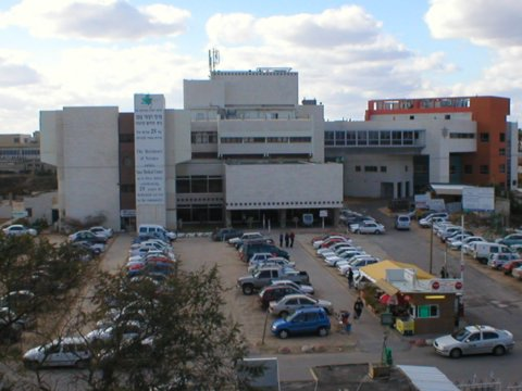 ייִדיש: לאניאדא שפיטאל.